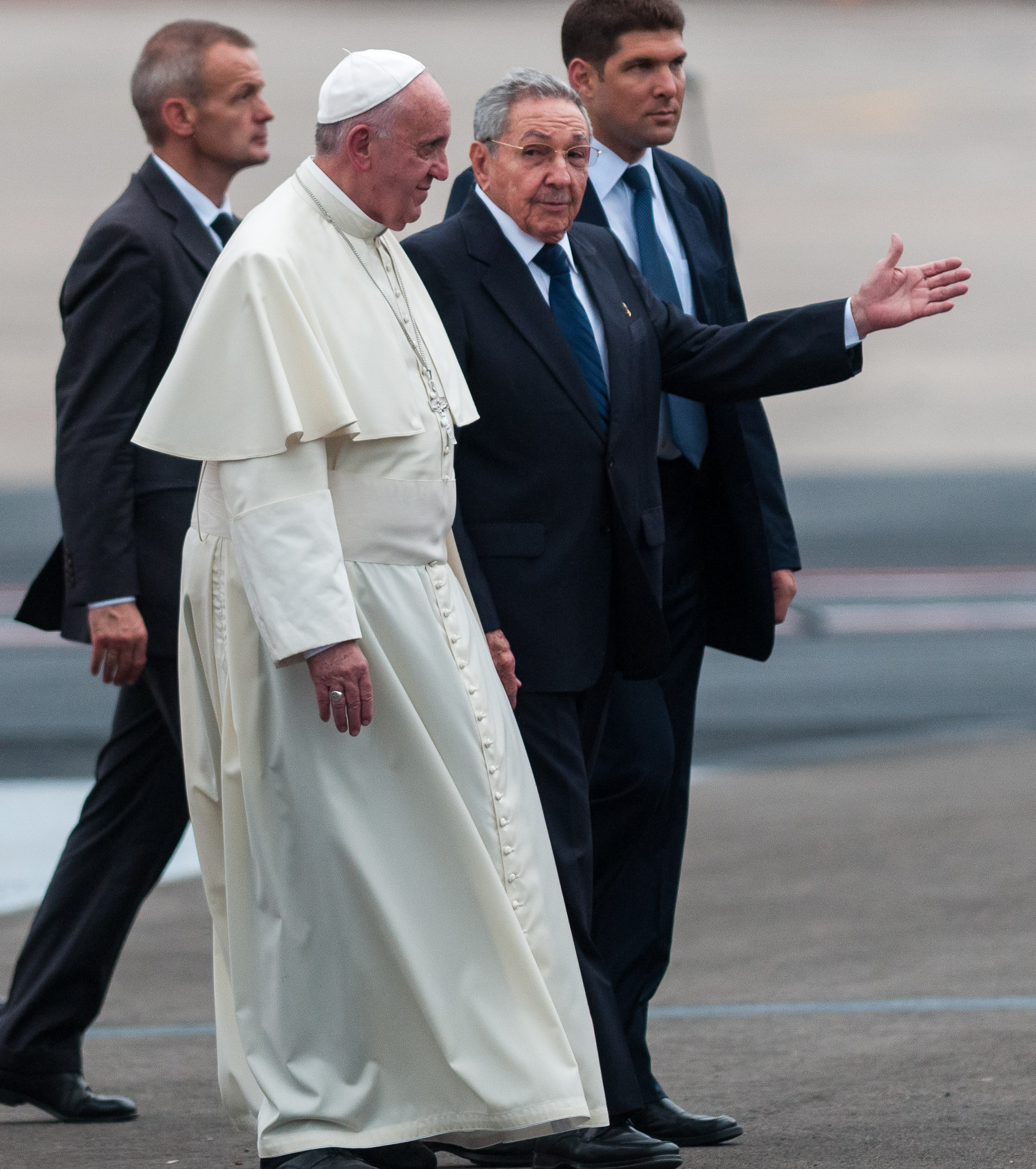 El presidente cubano Raúl Castro recibe al Papa Francisco tras arribar al Aeropuerto Internacional José Martí y así inicia su viaje apostólico a Cuba, el sábado 19 de septiembre de 2015, en La Habana, Cuba. FOTO de Calixto N. Llanes